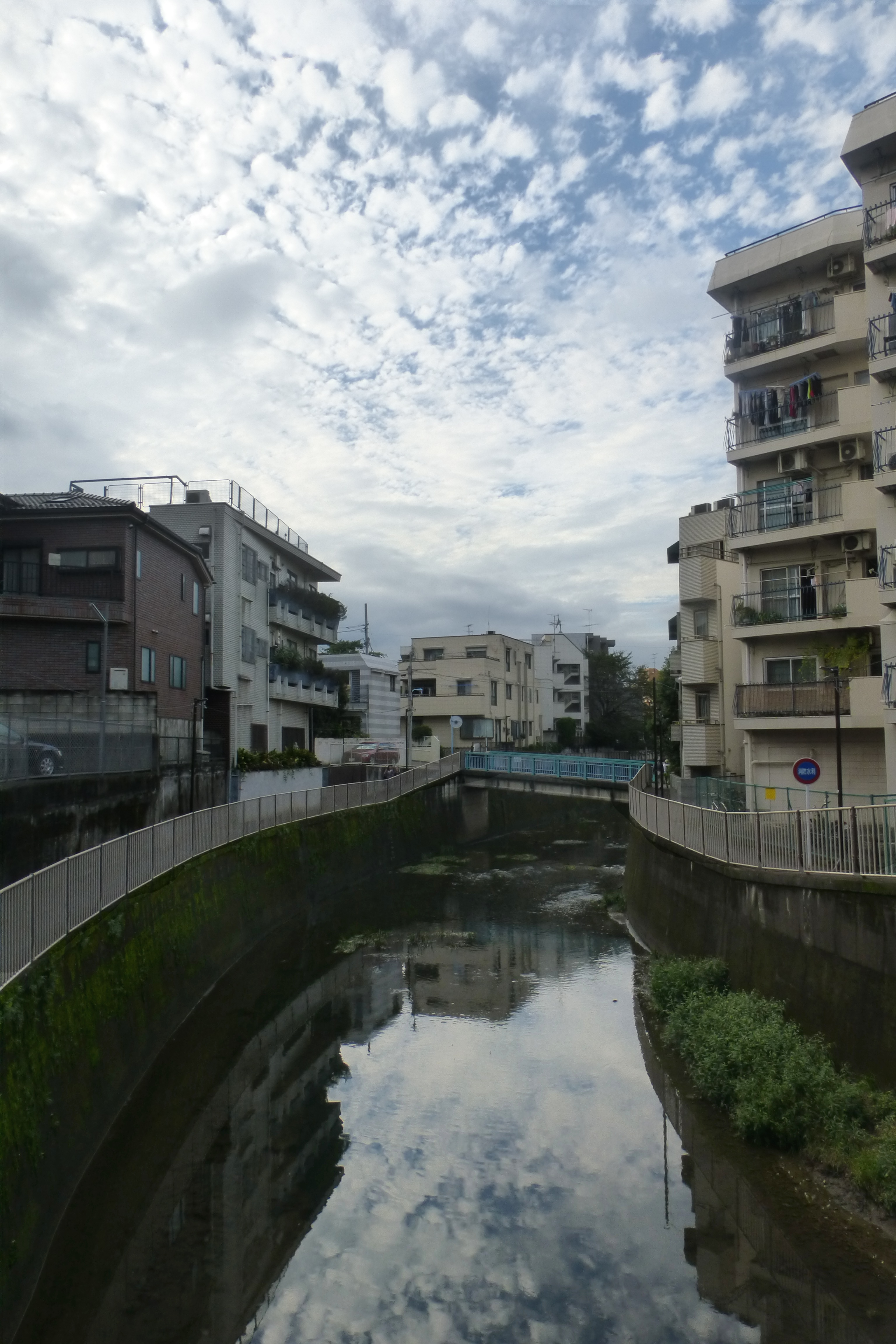 善福寺川（ぜんぷくじがわ, Zenpukuji River）は、東京都を流れる荒川水系神田川支流の一級河川である。写真は荻窪駅の近くに撮った。